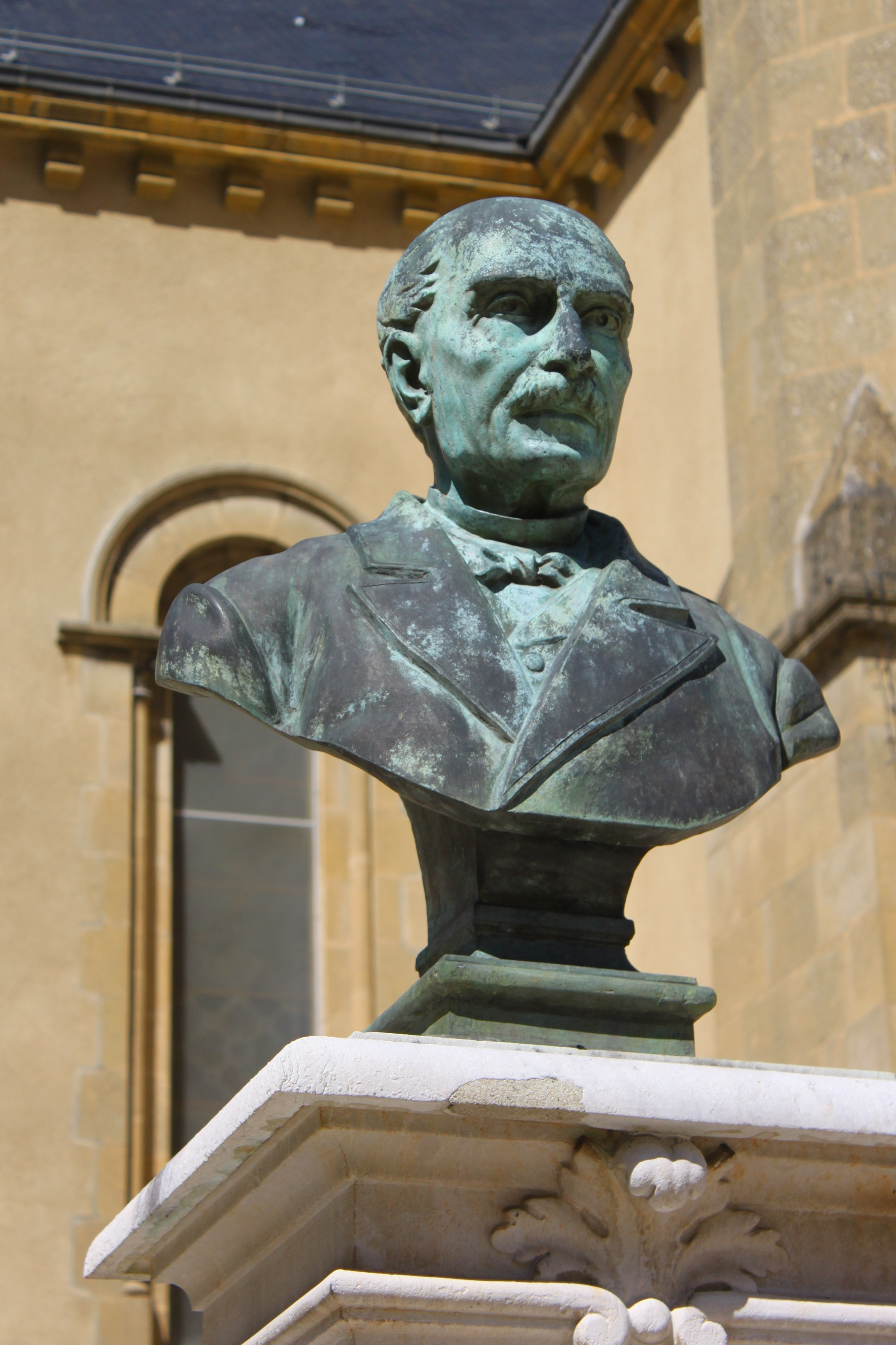 Buste de Melchior Joseph Marmonnier à Domène